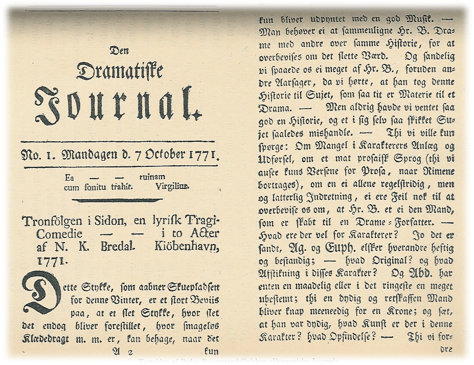 Den Dramatiske Journal, 7. oktober 1771. Teaterblad udgivet af Peder Rosenstand-Goiske.